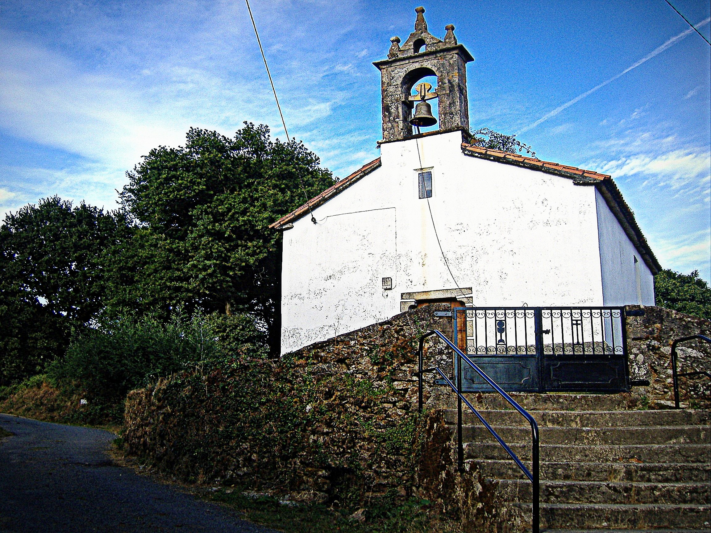 Igrexa de Santa Mariña de Pedrouzos, Melide.